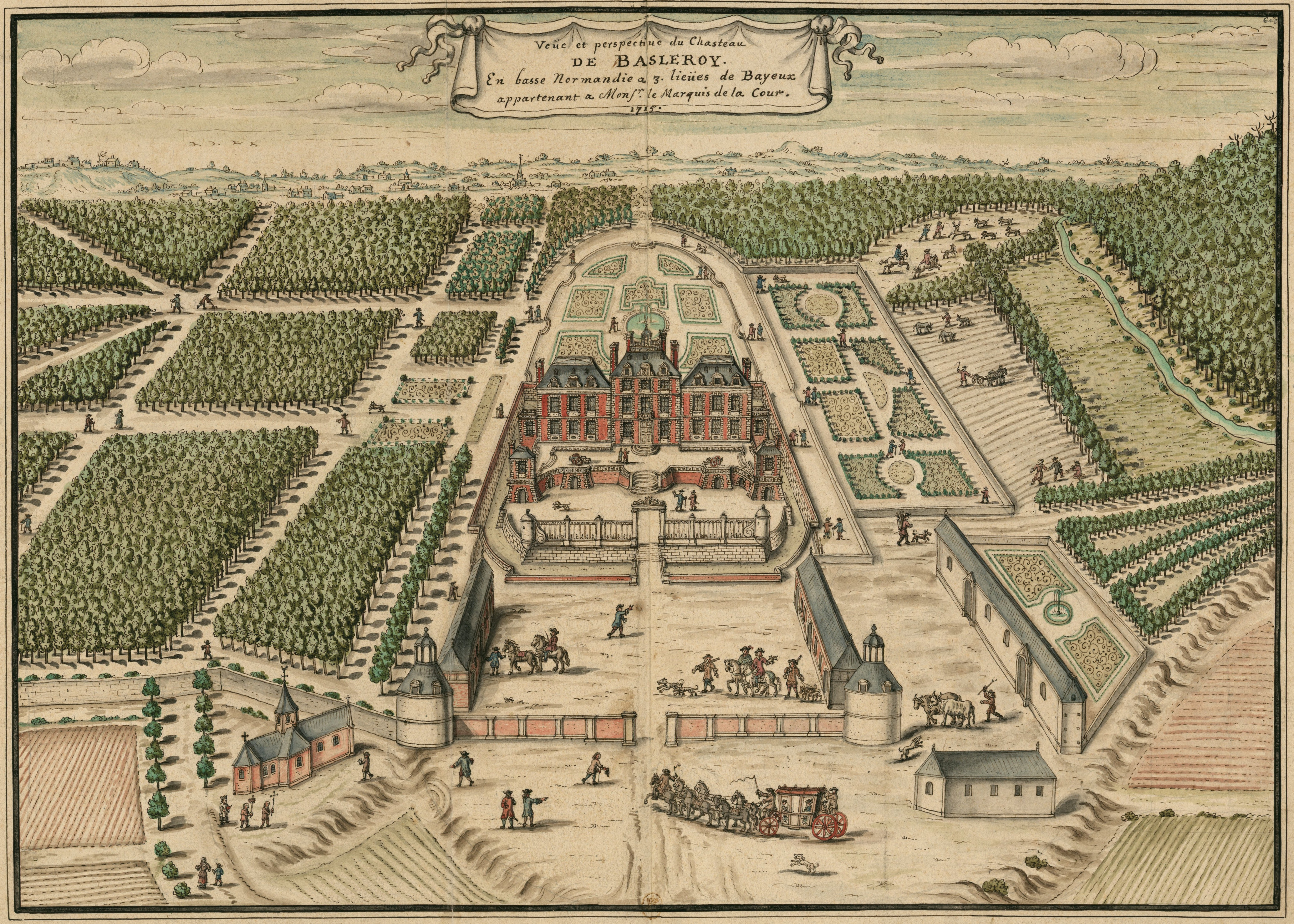 Perspektivische Zeichnung des Schlosses Balleroy in Frankreich